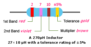 inductor-color-code